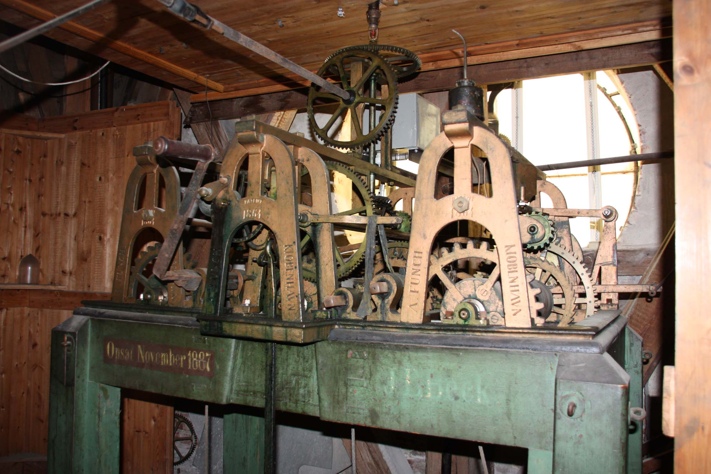 Klokkeurverk i Trefoldighetskirken i Arendal